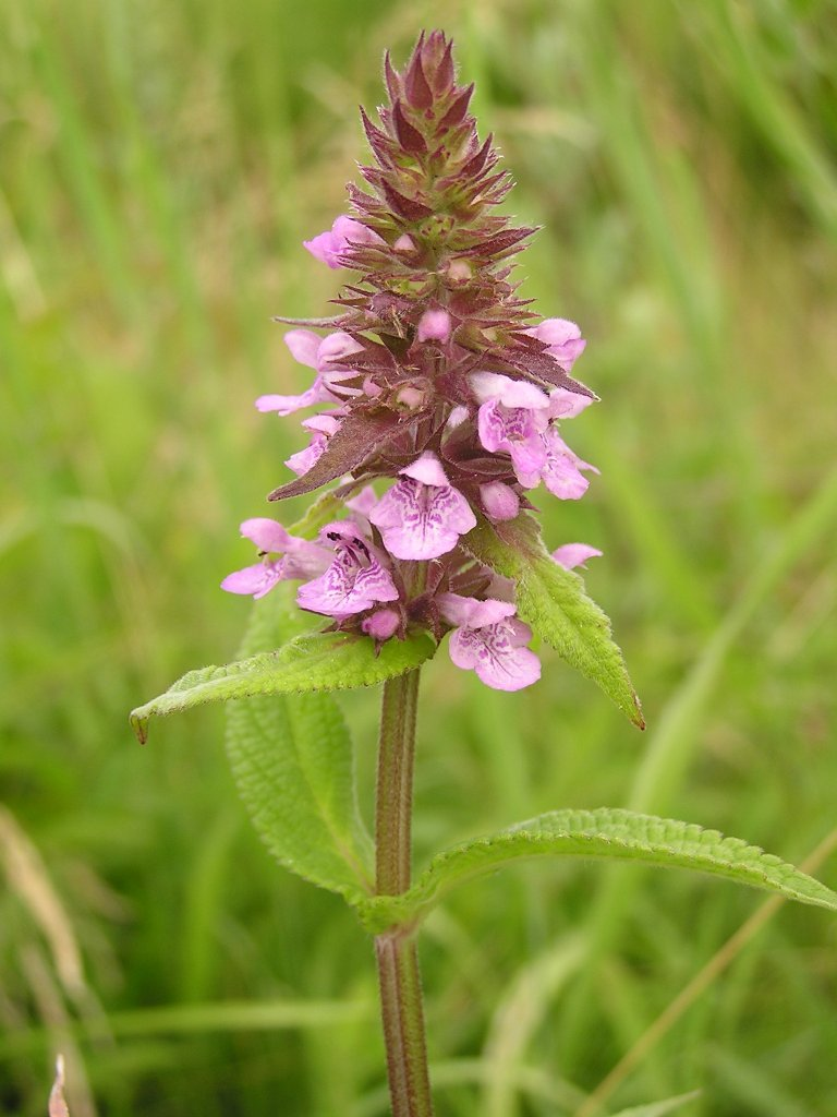 Stachys palustris am Bonner Rheinufer